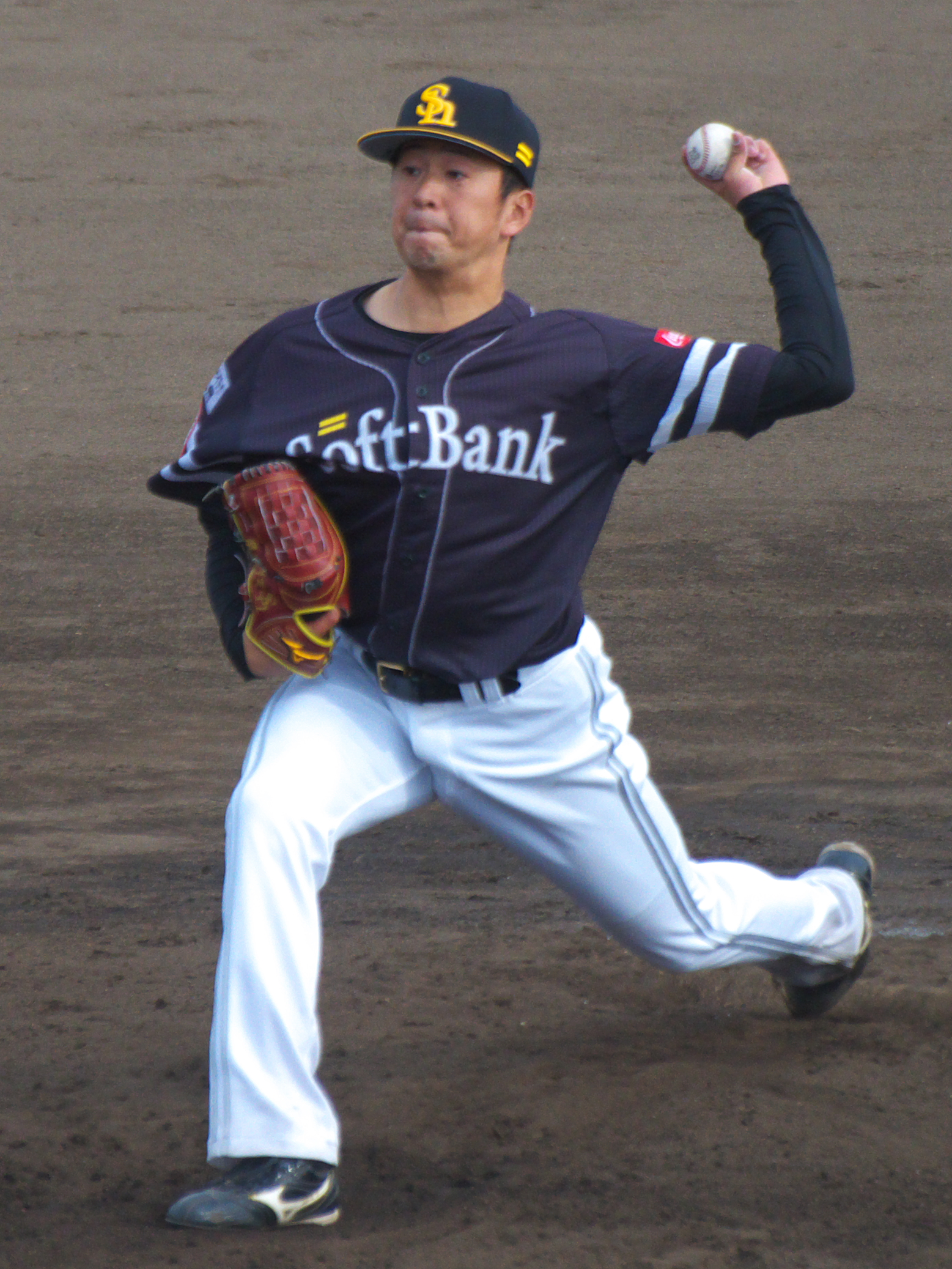 福岡ソフトバンクホークス渡邉雄大